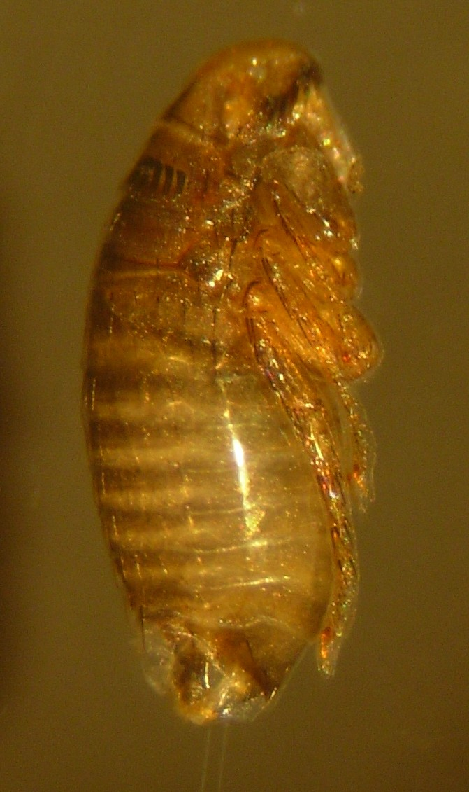 Nymphe âgée de la puce du chat et du chien (Ctenocephalides felis)